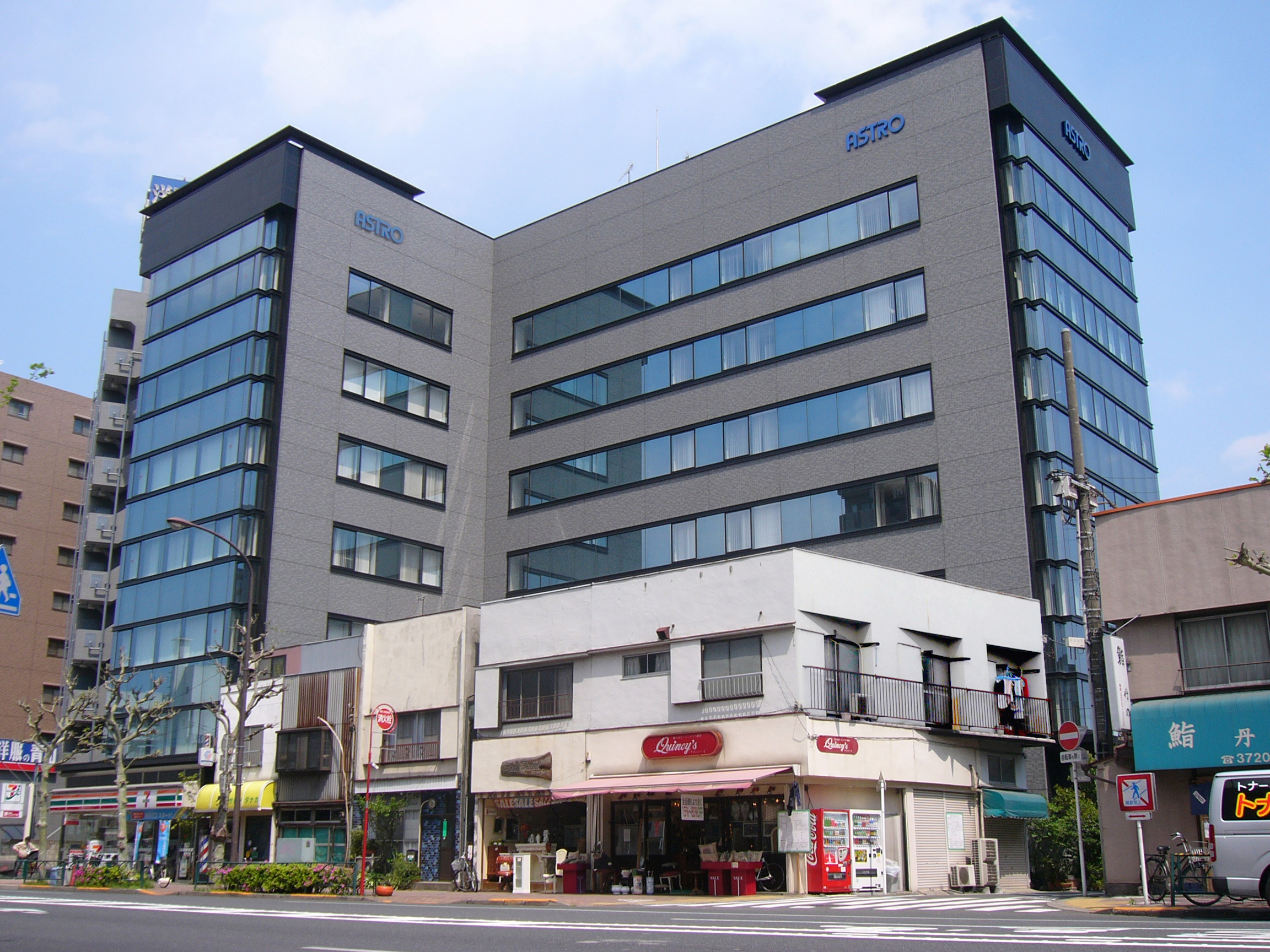 ＡＳＴＲＯＤＥＳＩＧＮビル